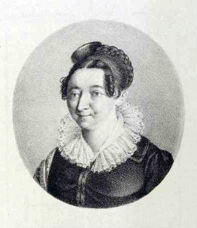 Актриса Елизавета Семёновна Сандунова (1772 — 1826)